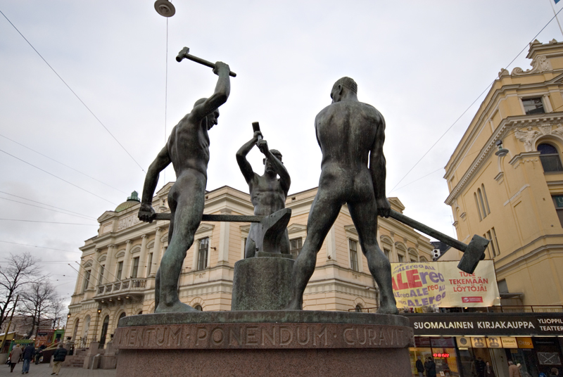 Kolme seppää / 3 smiths statue